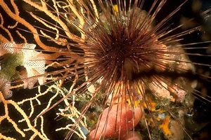 Riccio diadema (Centrostephanus longispinus) Mar Mediterraneo